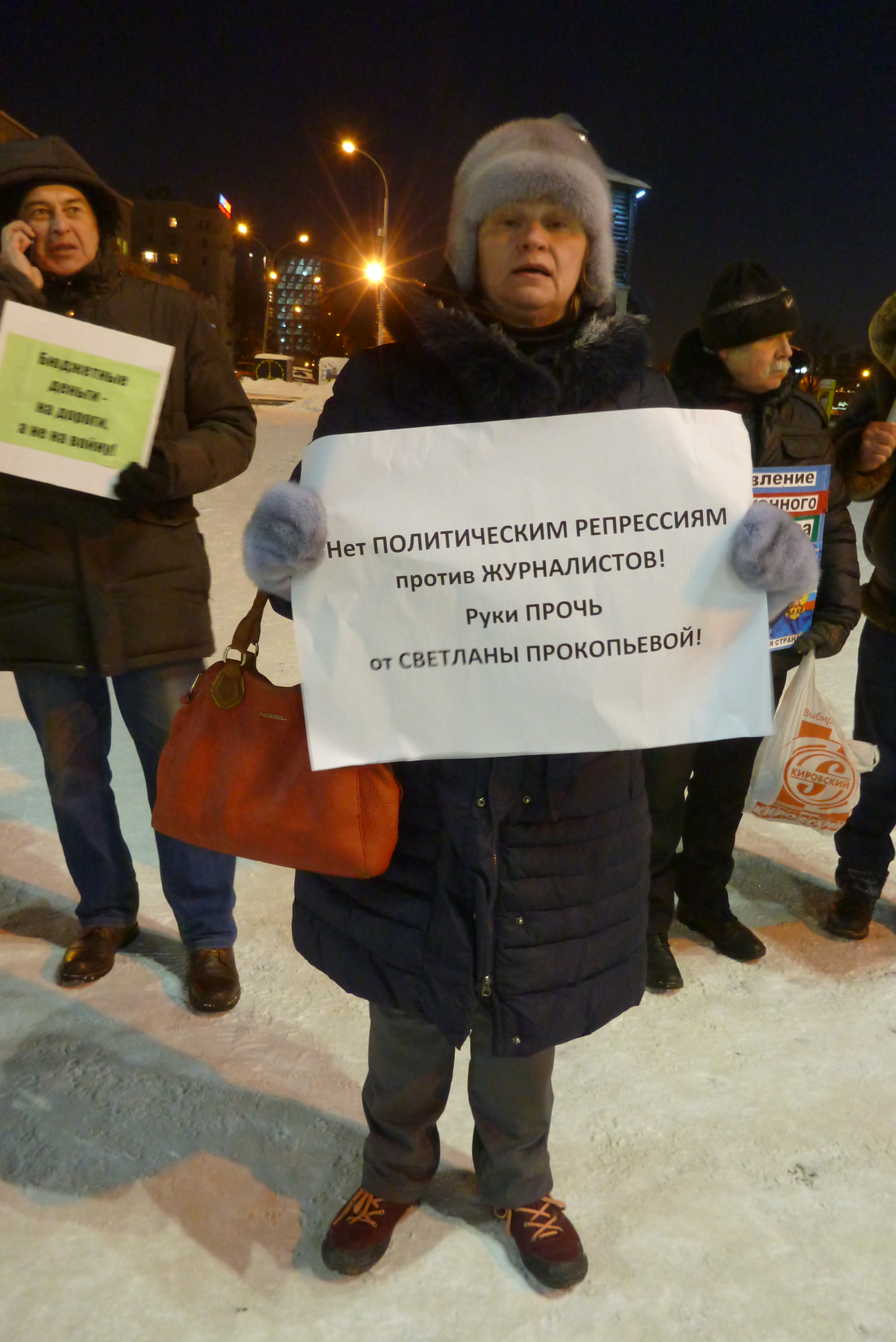 Елена Шукаева за Светлану Прокопьеву 6 февраля 2019 года